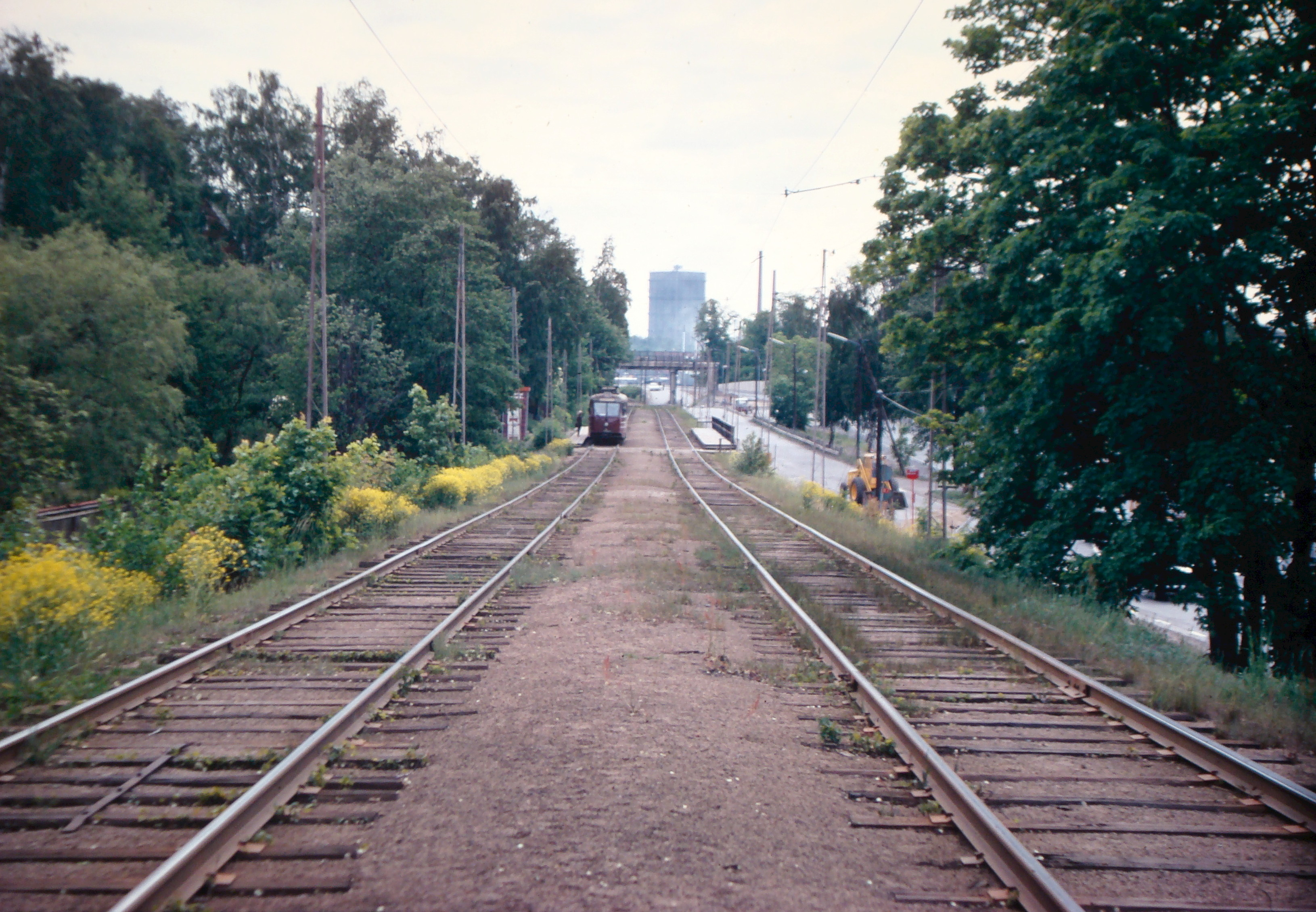 Tågrt vid Källbonäs station, norra Lidingöbanan, strax före nedläggningen ca 1971. Viadukten delvis riven, biltrafiken till Brogrenen omdirigerad på väg utefter banan.